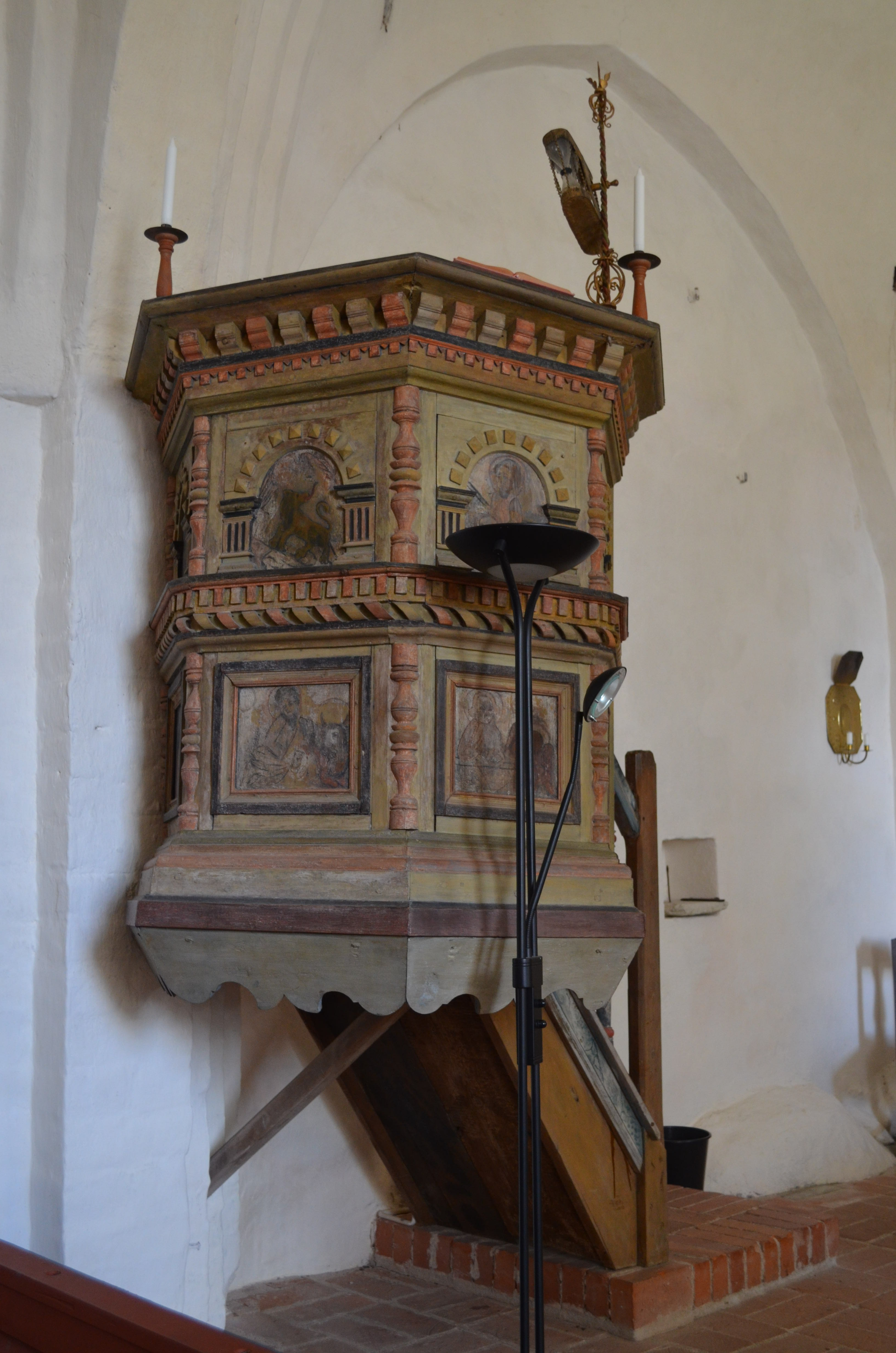 Predikstolen